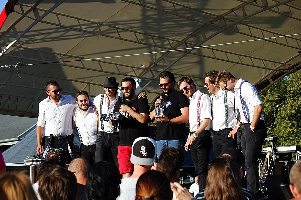 Krst albumu v Michalovciach.